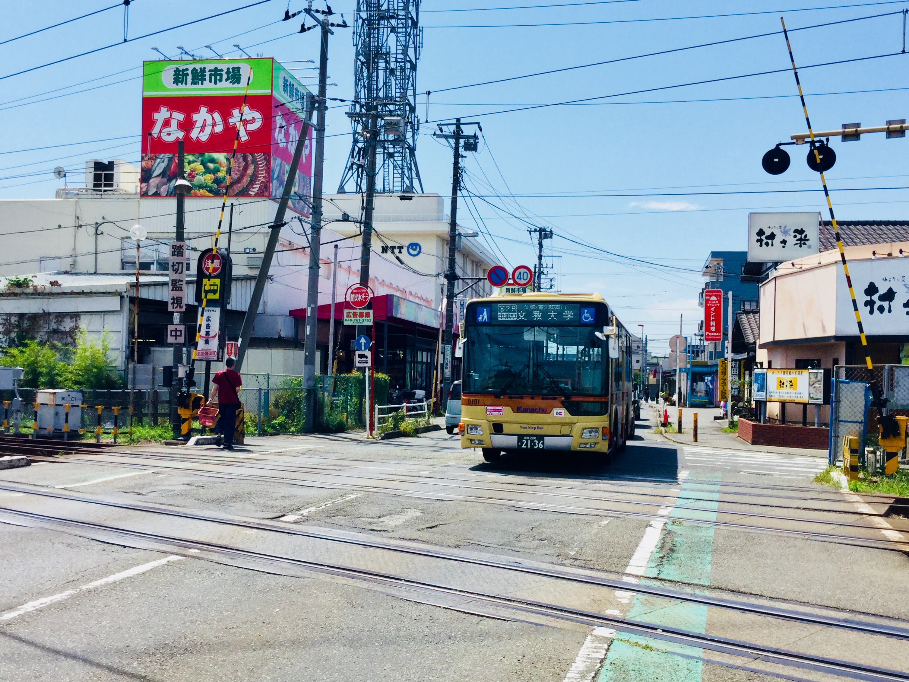 寒川駅南口(用田踏切)